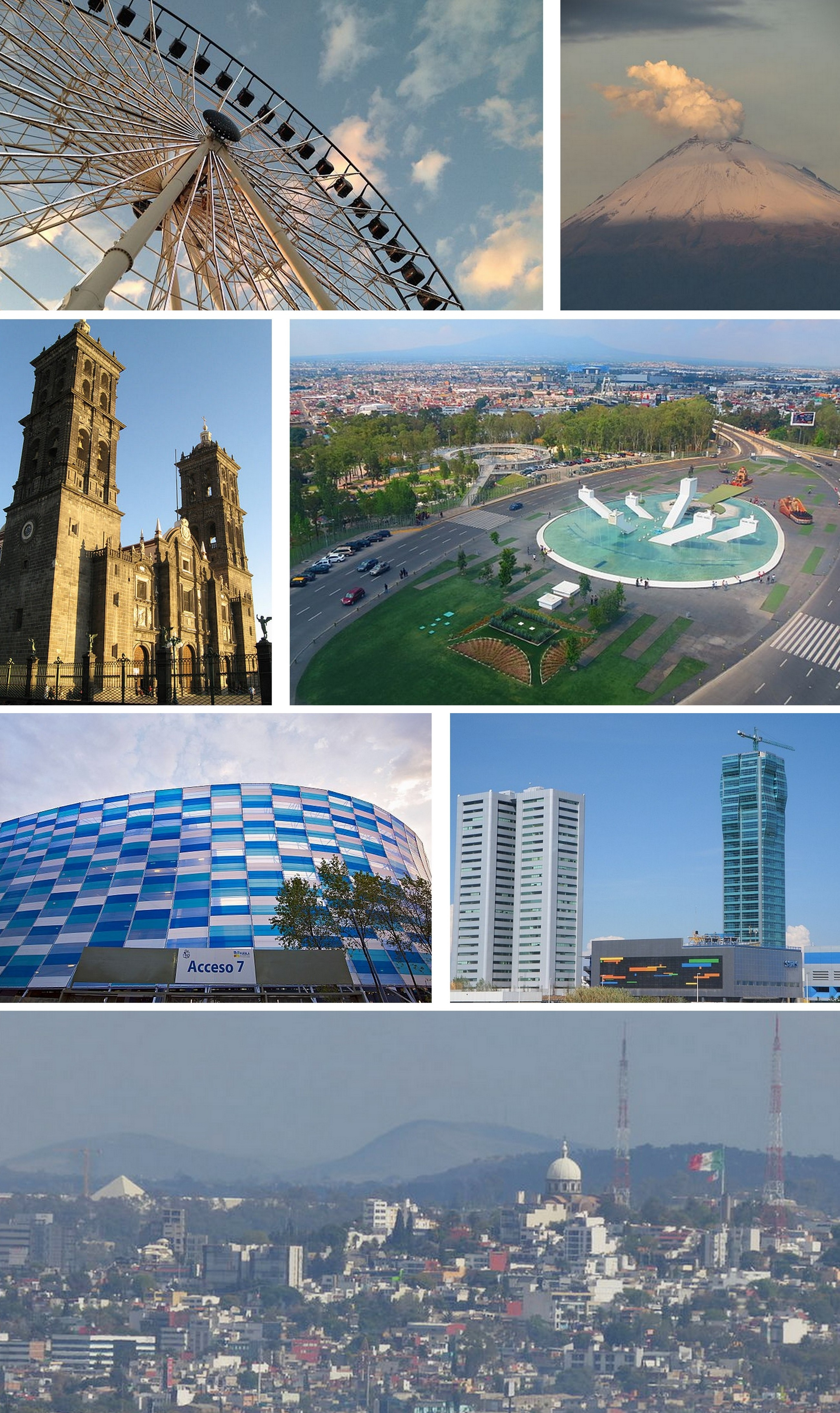 Mosaico fotográfico de Puebla: Estrella de Puebla Volcán Popocatépetl visto desde Puebla Catedral de Puebla Monumento a Ignacio Zaragoza Estadio Cuauhtémoc Torres de angelopolis Vista de la ciudad de Puebla